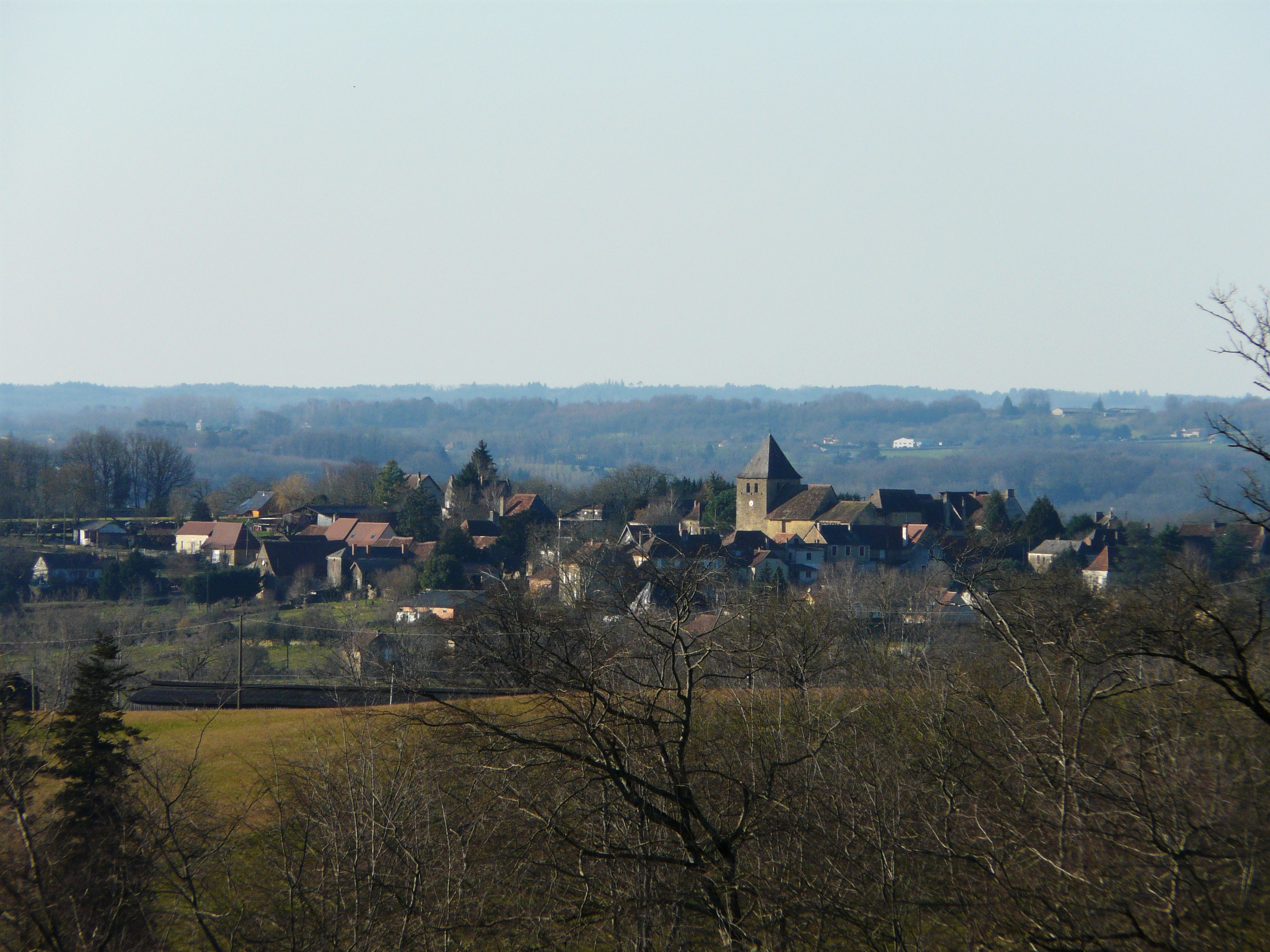 Le village de Saint-Sulpice-d'Excideuil, Dordogne, France. Vue prise depuis le sud-est.